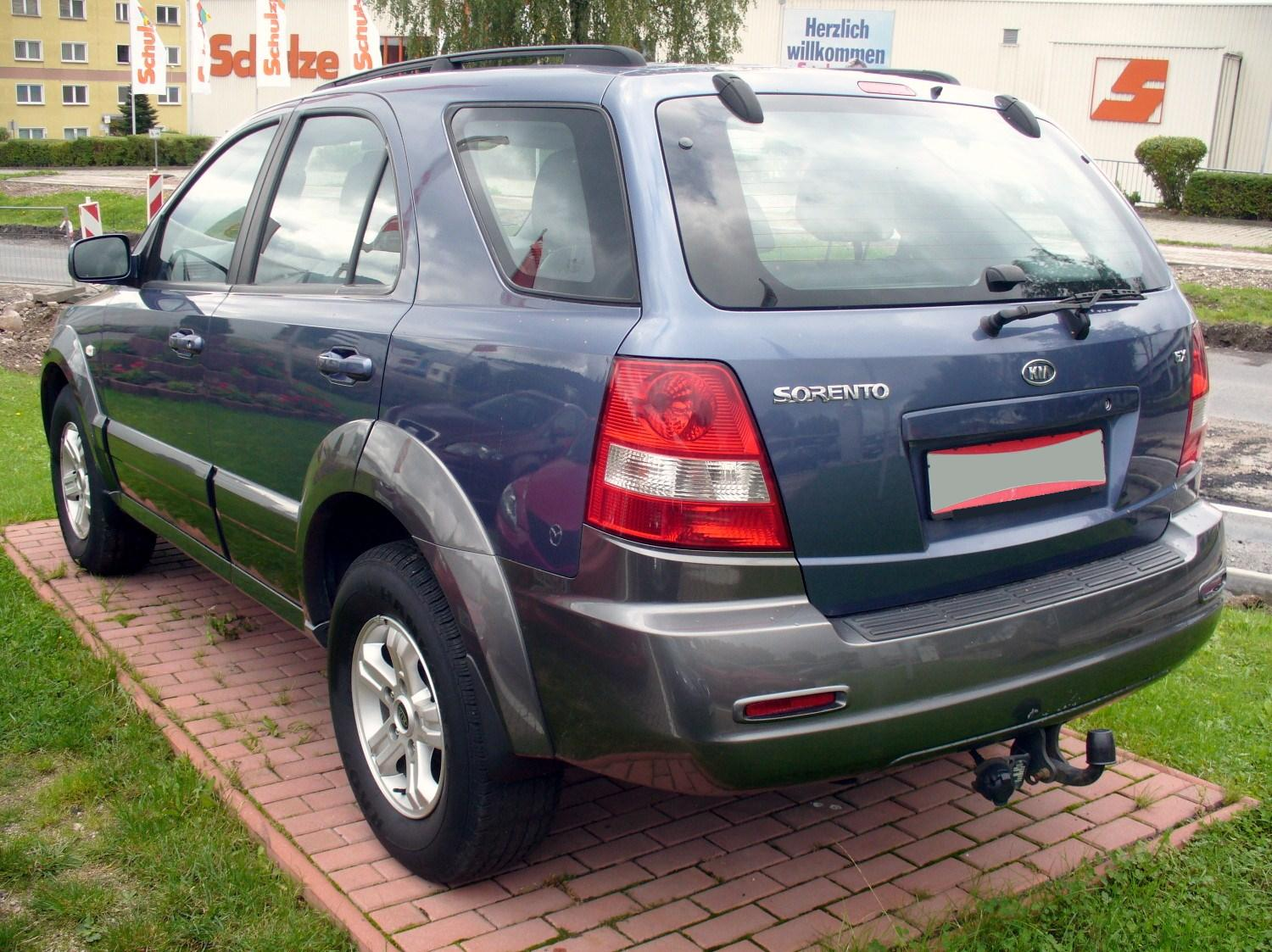 Kia Sorento